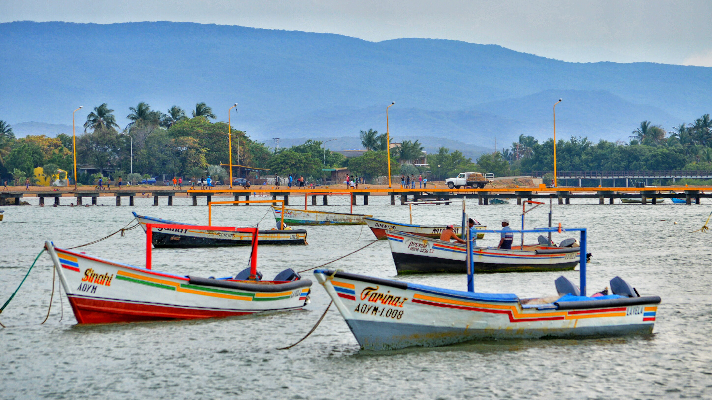 La Vela de Coro, Falcón, Venezuela